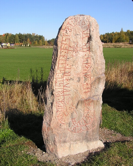 Runsten Sö107 Gredby Etuna, copyright Klaus Fuisting